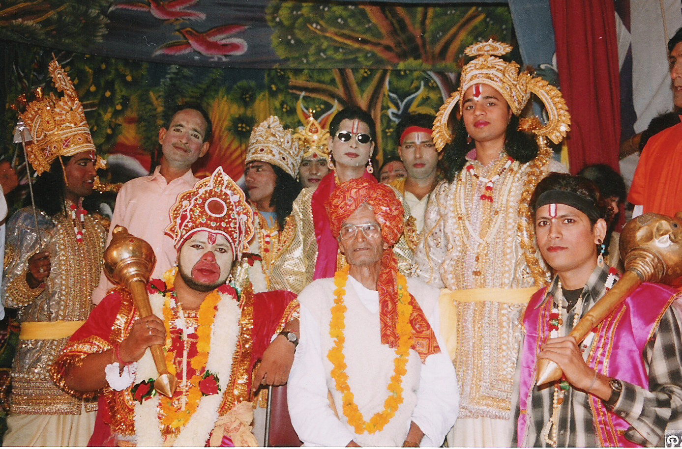 Ramlila troupe